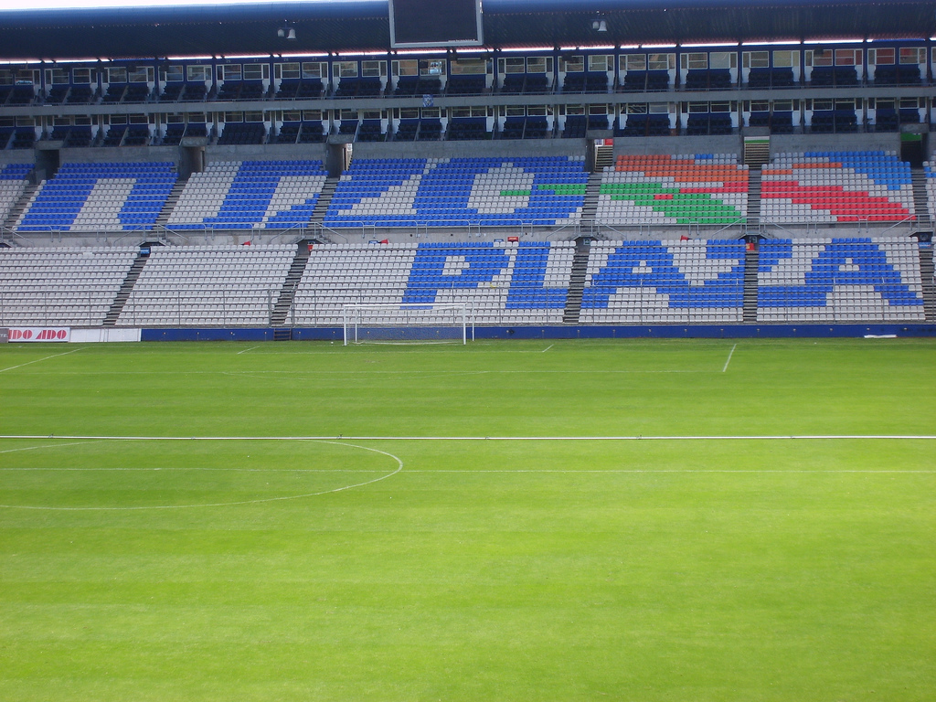 A nivel de cancha!!! =D